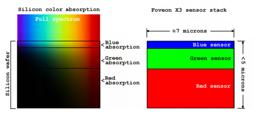 foveon filter image